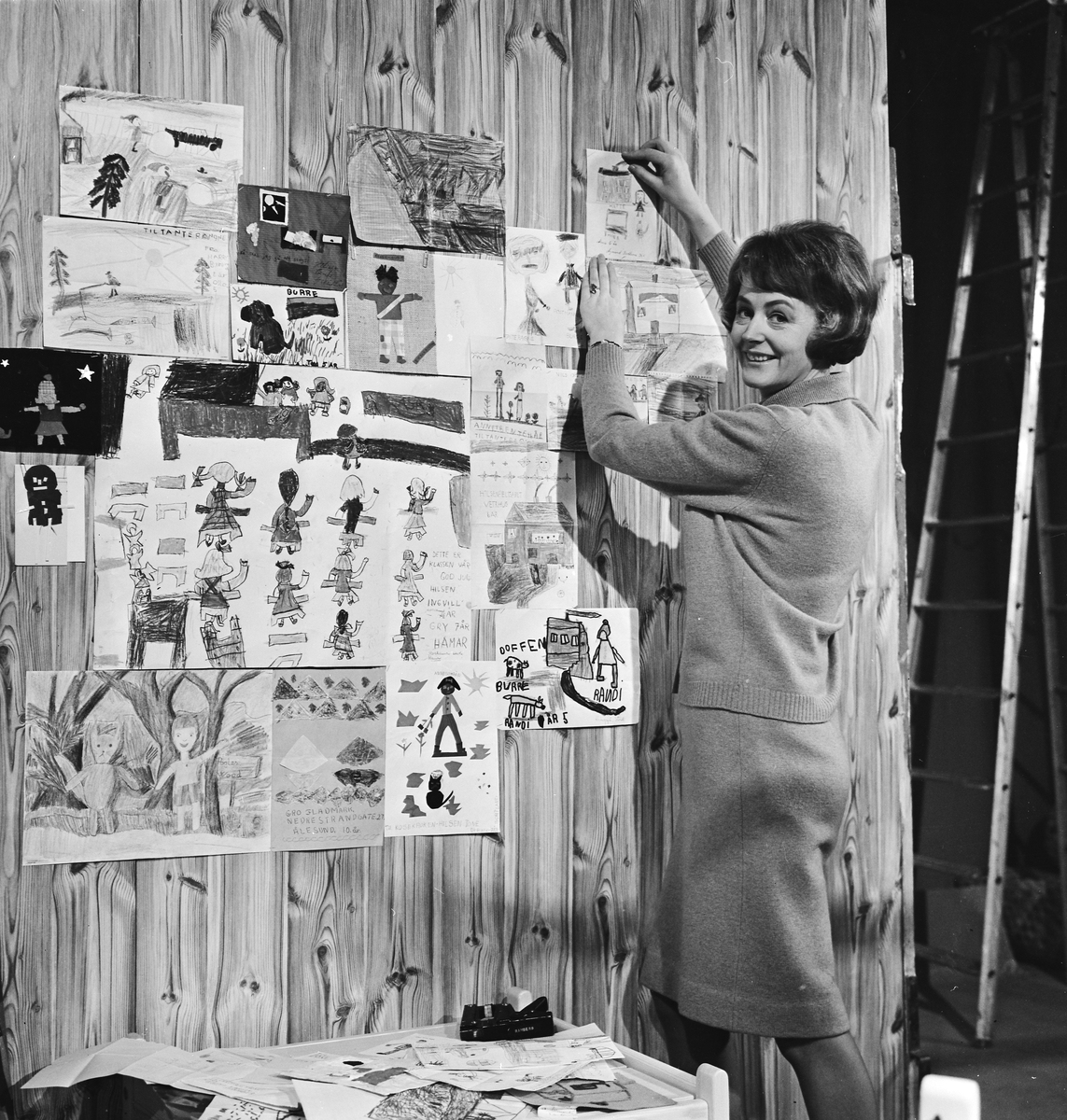 Ragne Tangen (født 12. mars 1927) er en norsk programleder, forfatter og fjernsynspioner.